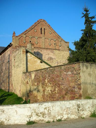 Kővágószőlős